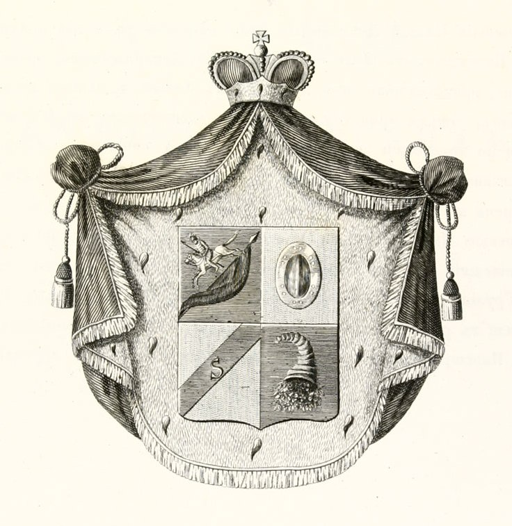 герб рода князей Цициановых